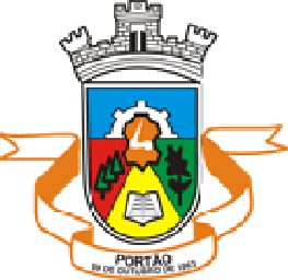 Coat of arms of Portão, Rio Grande do Sul, Brazil.